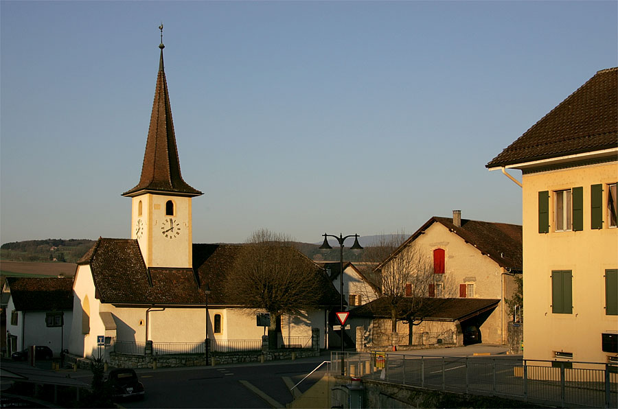 Kirche in Eclépens